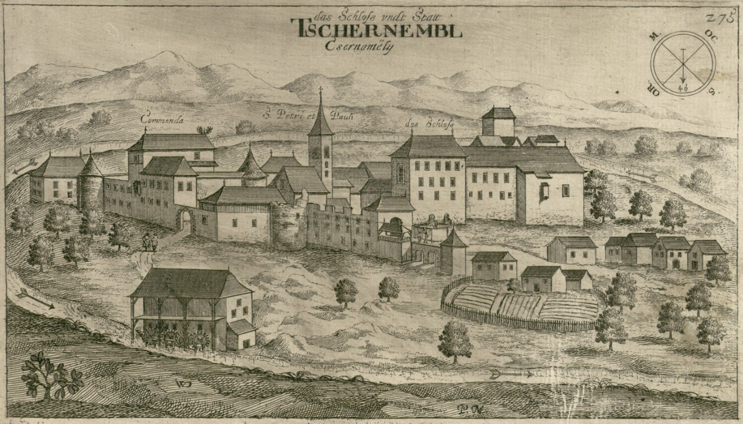 Črnomelj